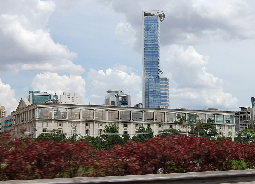 Daslu, luxurious department store in Sao Paulo, Brazil.